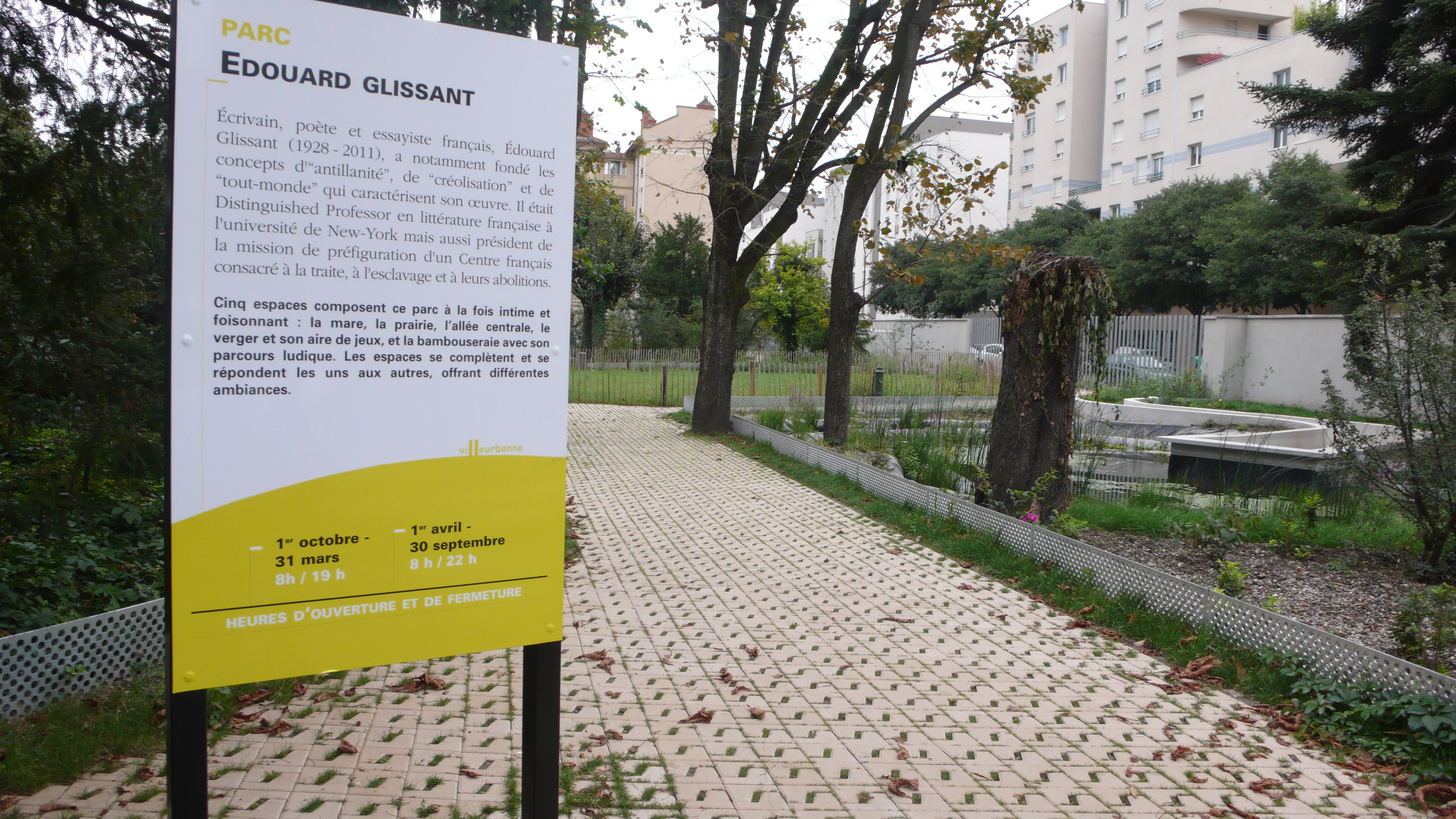 jardin Edouard Glissant (F-69100, Villeurbanne) - inauguré le 01/07/2011